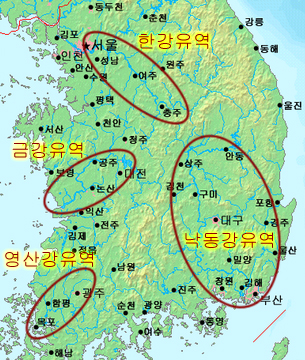 4대강 정비 사업의 대상 지역(관련 기사 참고)